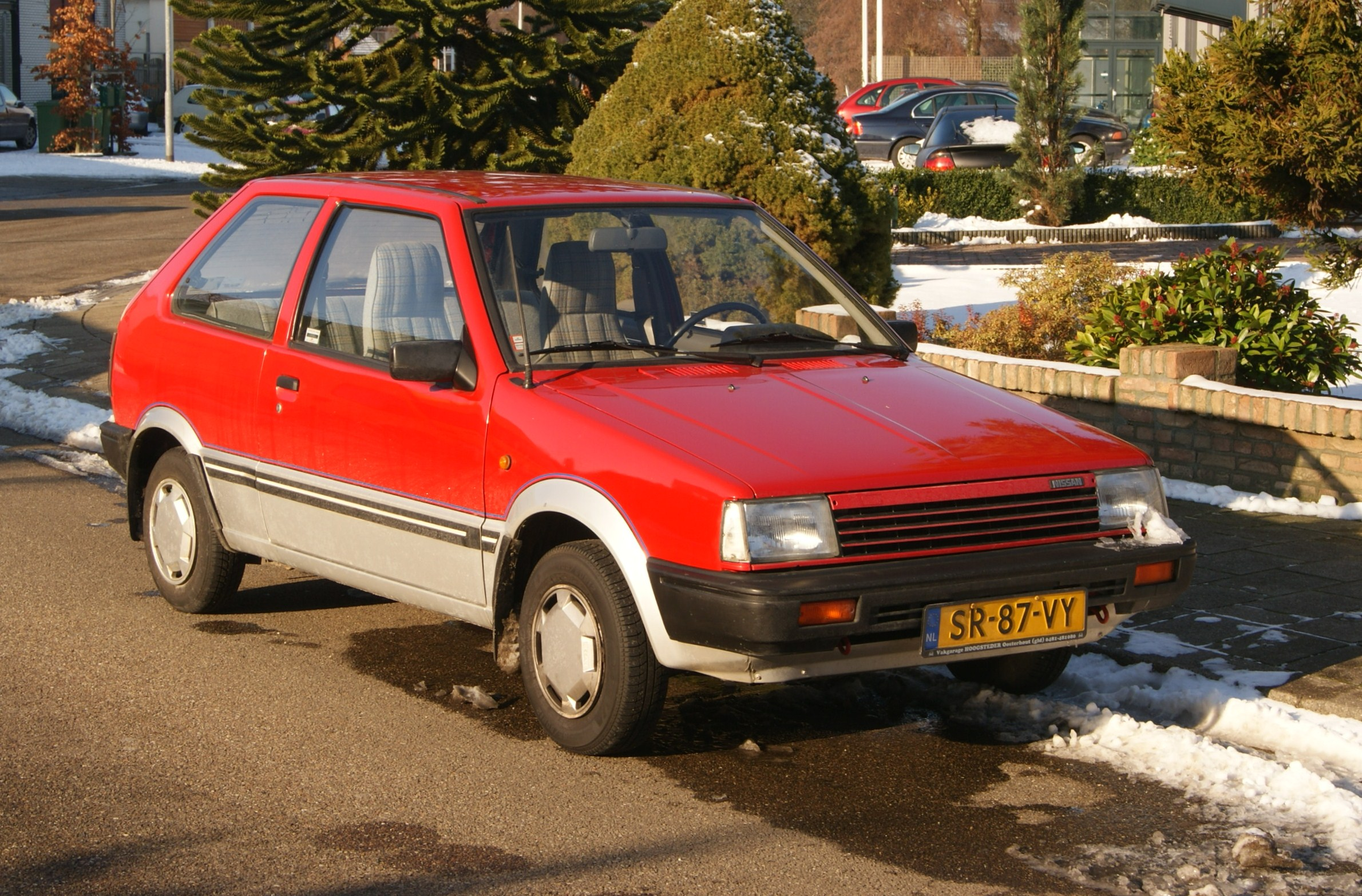 SR-87-VY